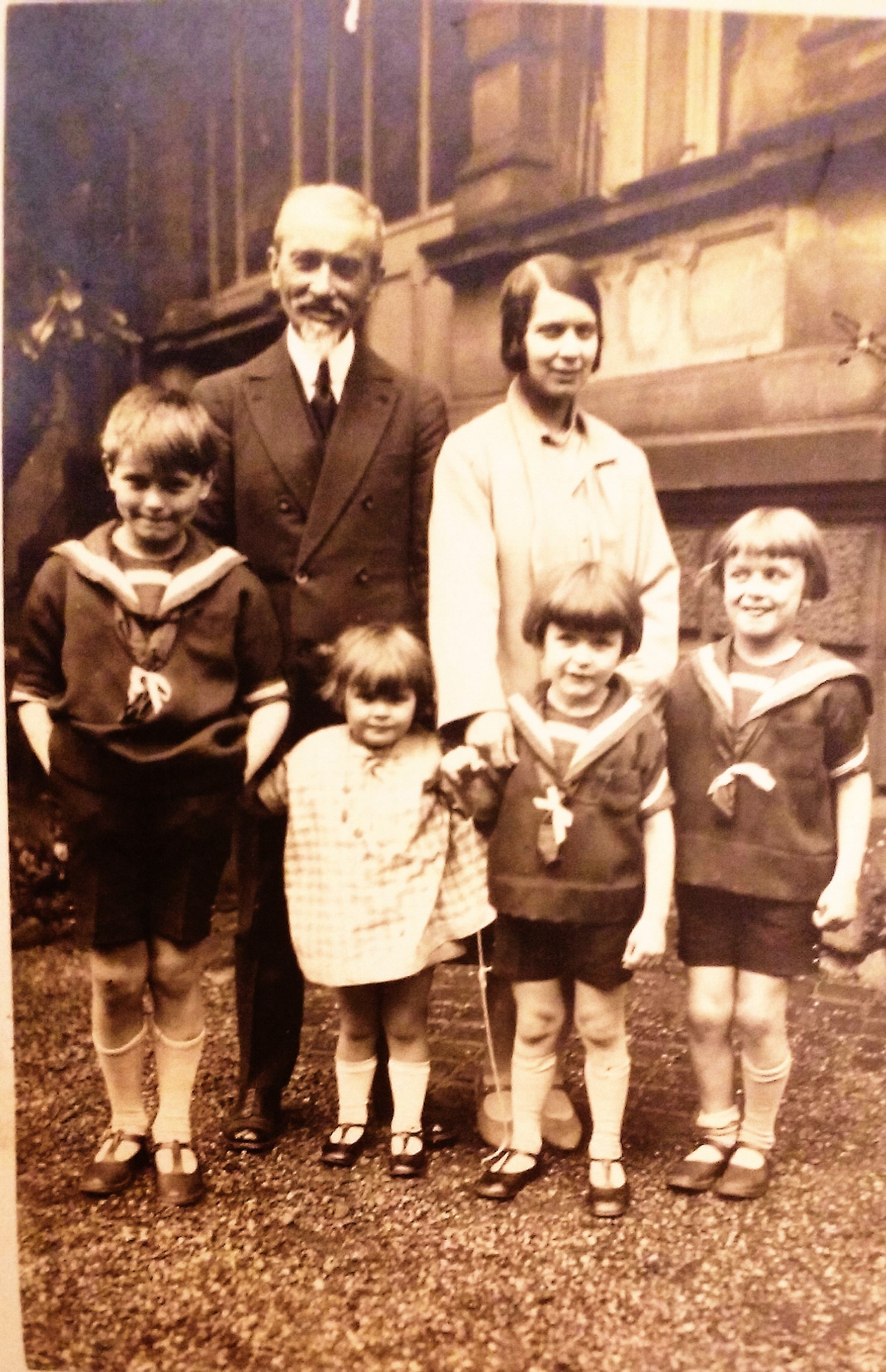 Charles Petit-Dutaillis accompagné de sa deuxième épouse et des 4 enfants de sa fille Charlotte épouse Hentschel